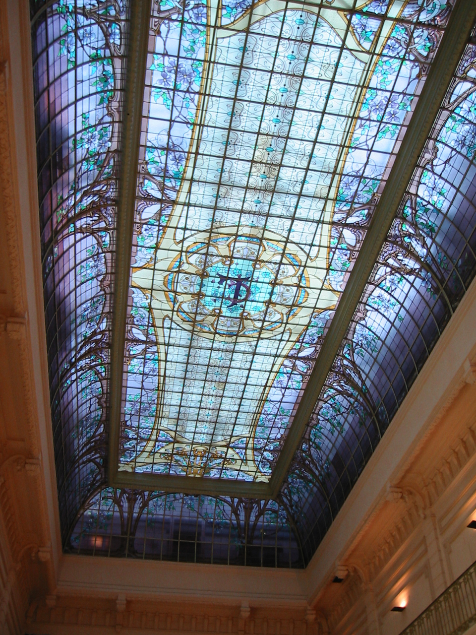 Verrière du Crédit Lyonnais, rue Saint-Georges à Nancy, France. Le crédit lyonnais de Nancy conserve la plus vaste verrière de vitraux de style École de Nancy. maître-verrier : Jacques Gruber, année 1901